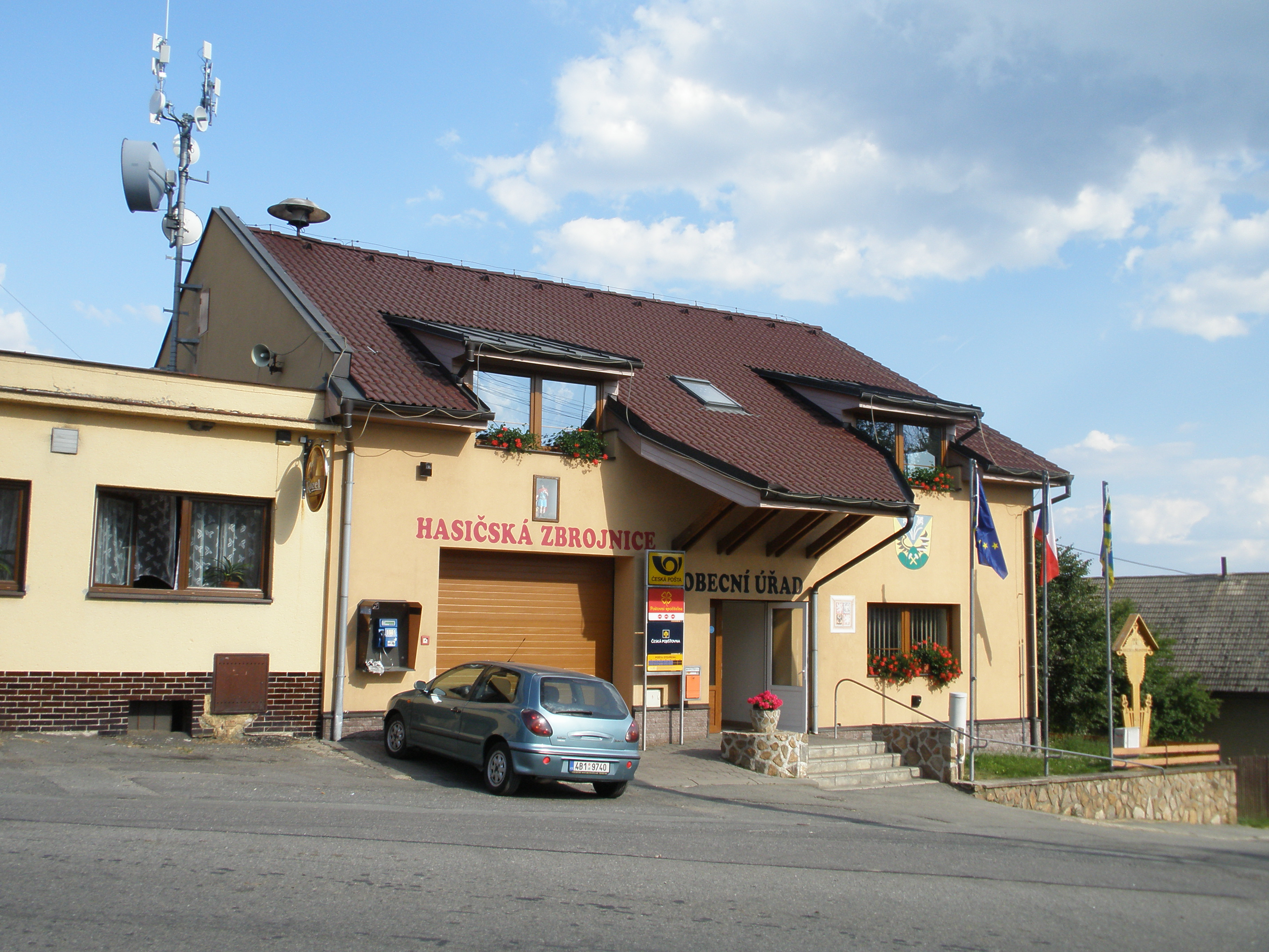 Obecní úřad a hasičská zbrojnice v Rozseči nad Kunštátem